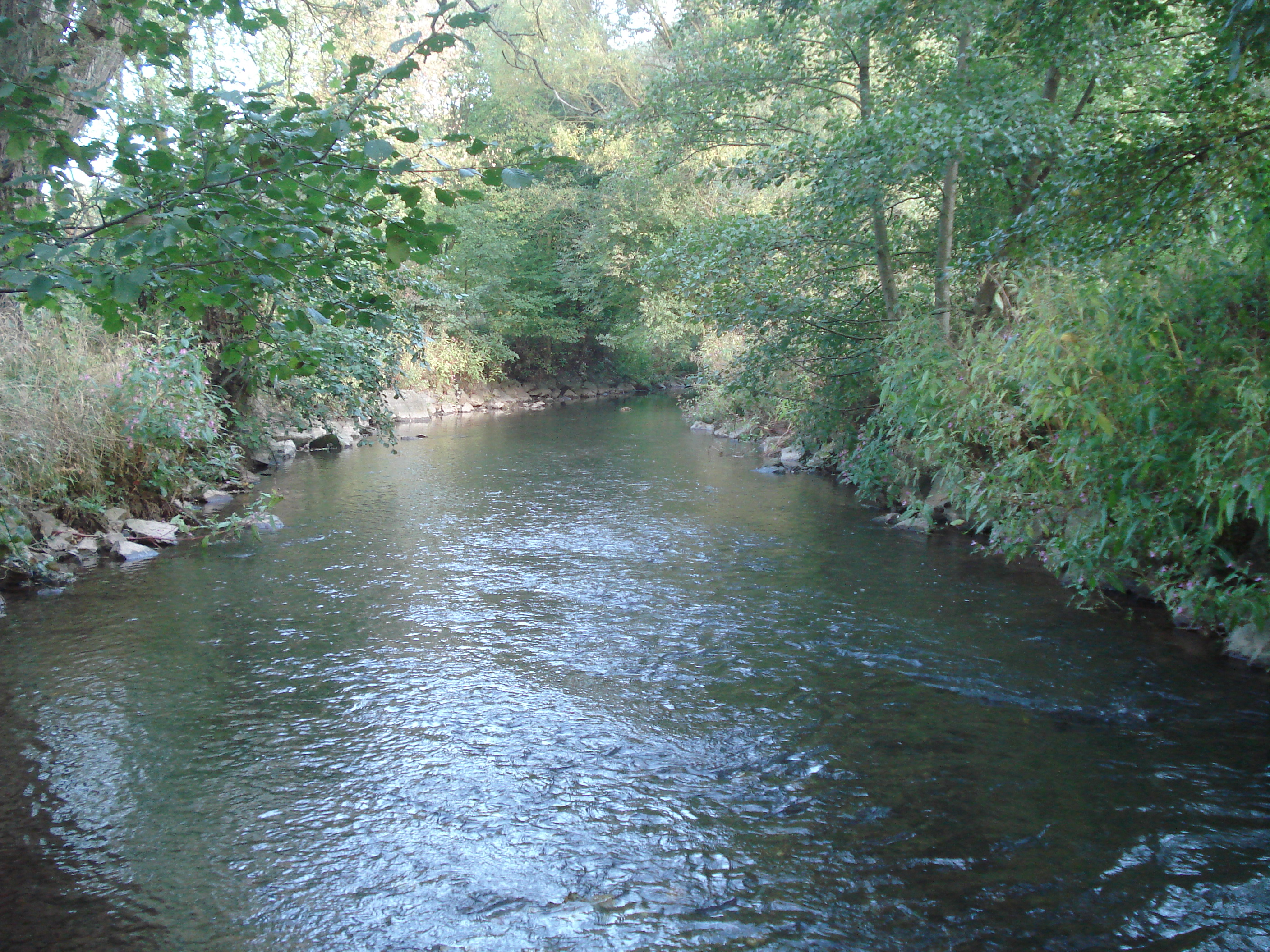 Der Billbach bei Schneeberg